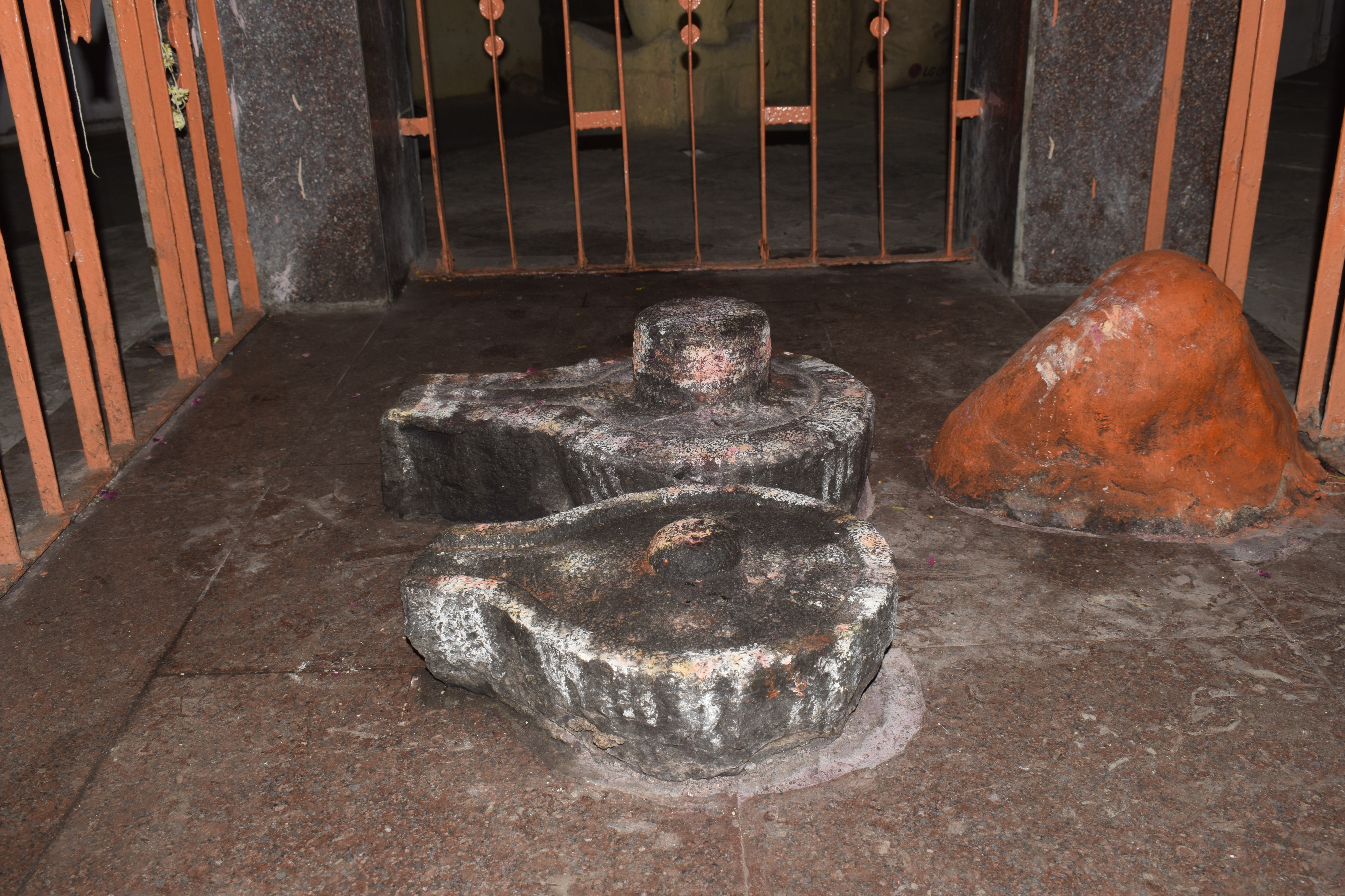 श्री होमेश्वर लिंग